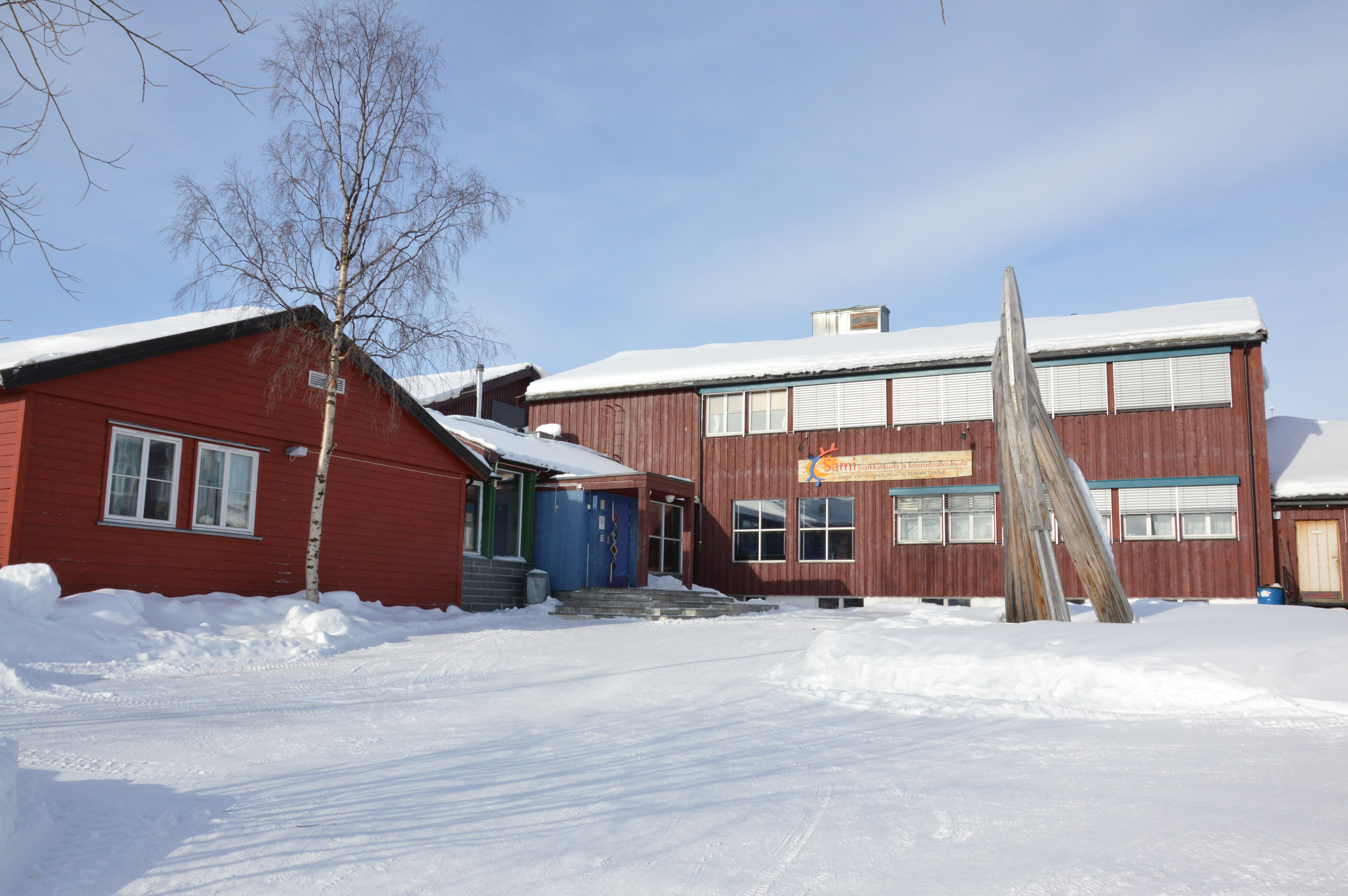 Samisk videregående skole og reindriftsskole i KautokeinoDavvisámegiella: Sámi joatkkaskuvla ja boazodoalloskuvla Guovdageainnus